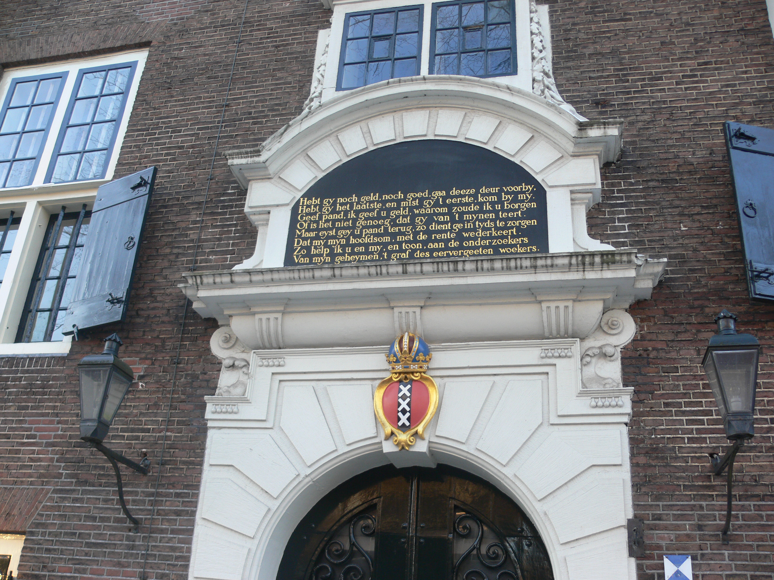 Amsterdam - Stadsbank van Lening. Oudezijds Voorburgwal 300.